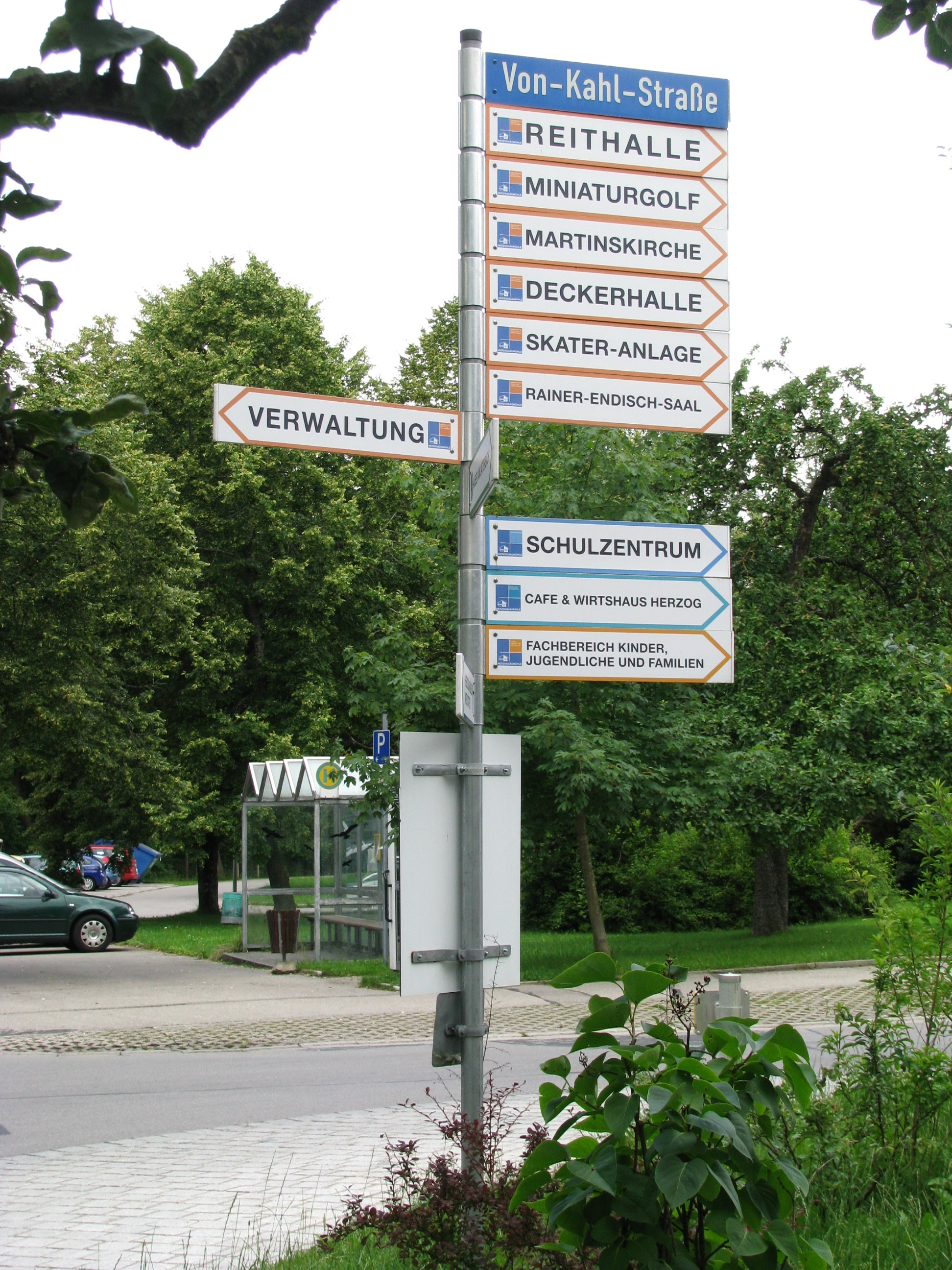 Wegweiser zu verschiedenen Einrichtungen in der Herzogsägmühle.